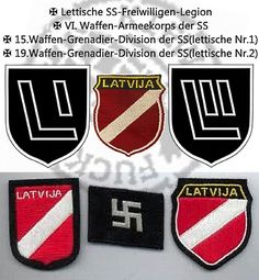 Insignias.